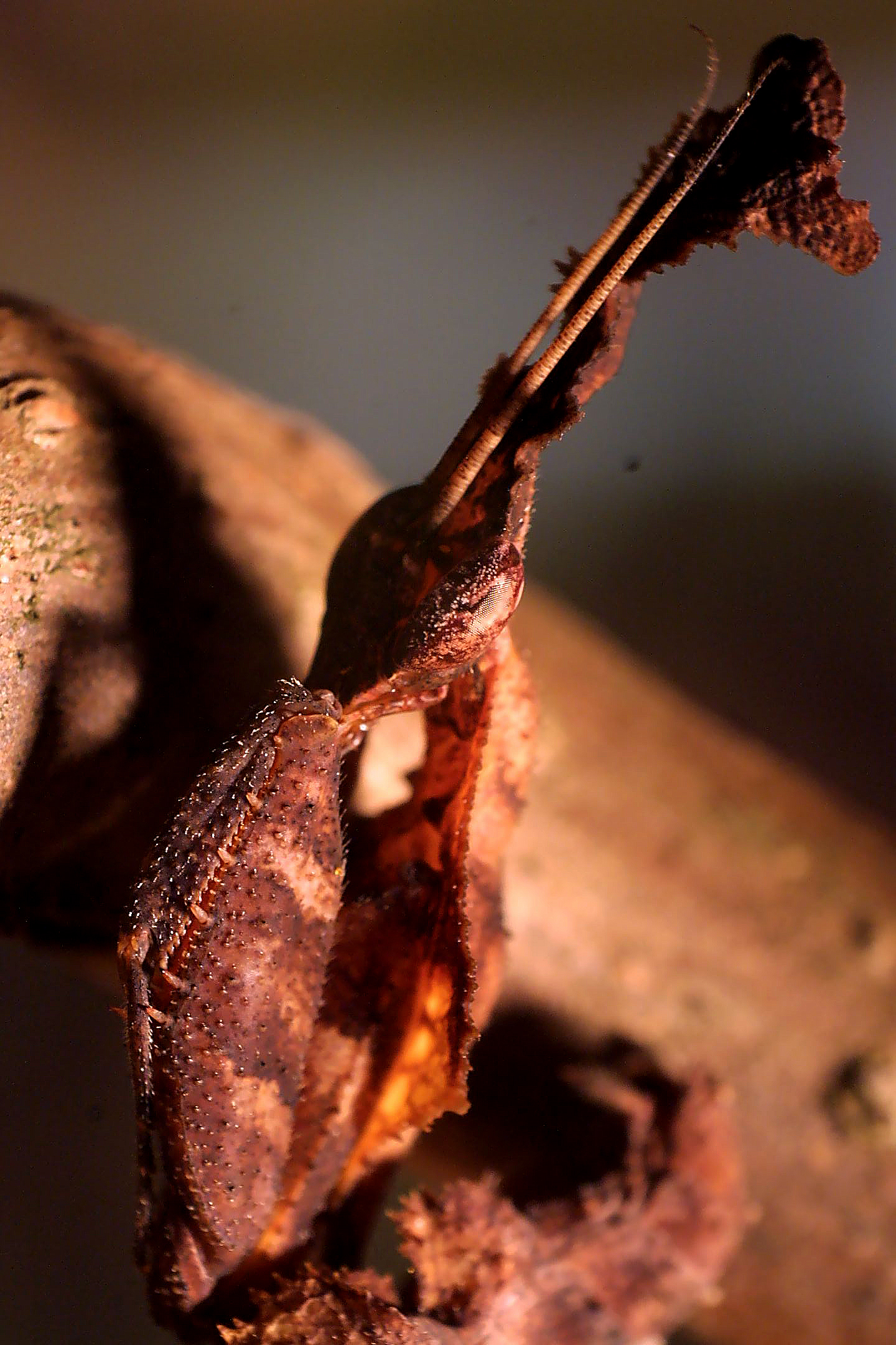 Detailbild des Kopfes einer Phyllocrania Paradoxa (Männliches Tier)